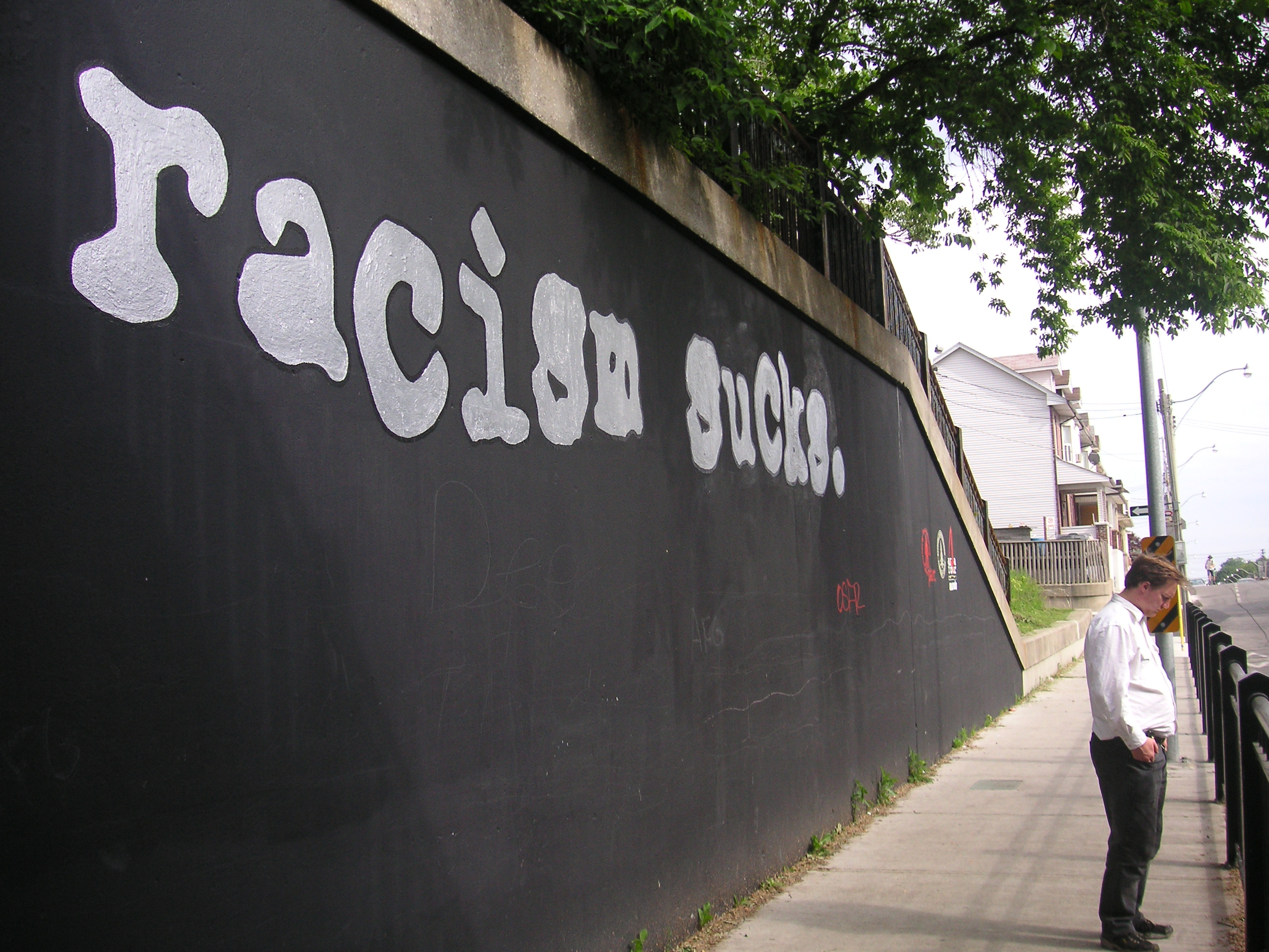 Mural on Jones Avenue, Toronto, Canadayes it does